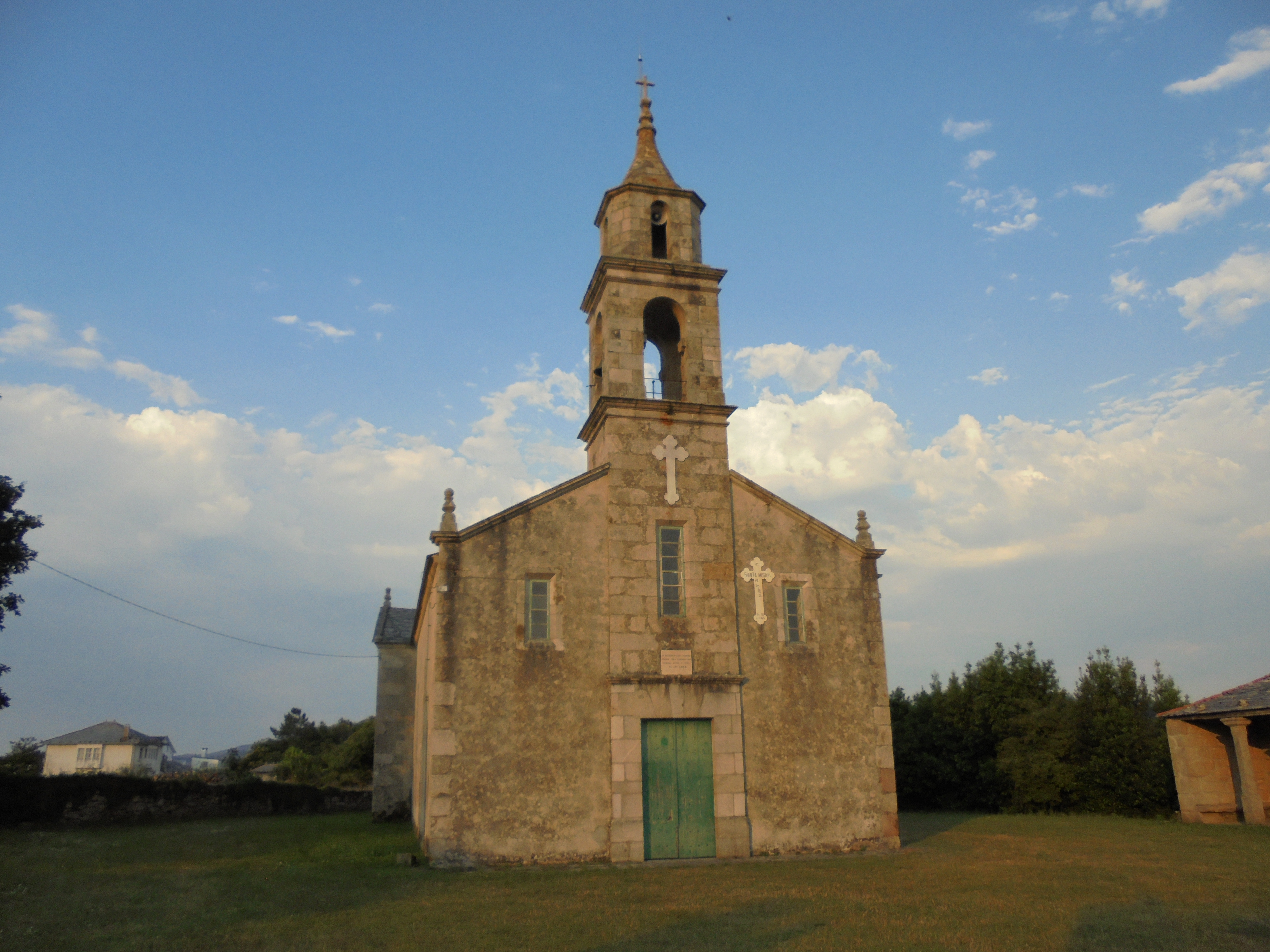 Igrexa parroquial de San Pedro de Mor (Alfoz)